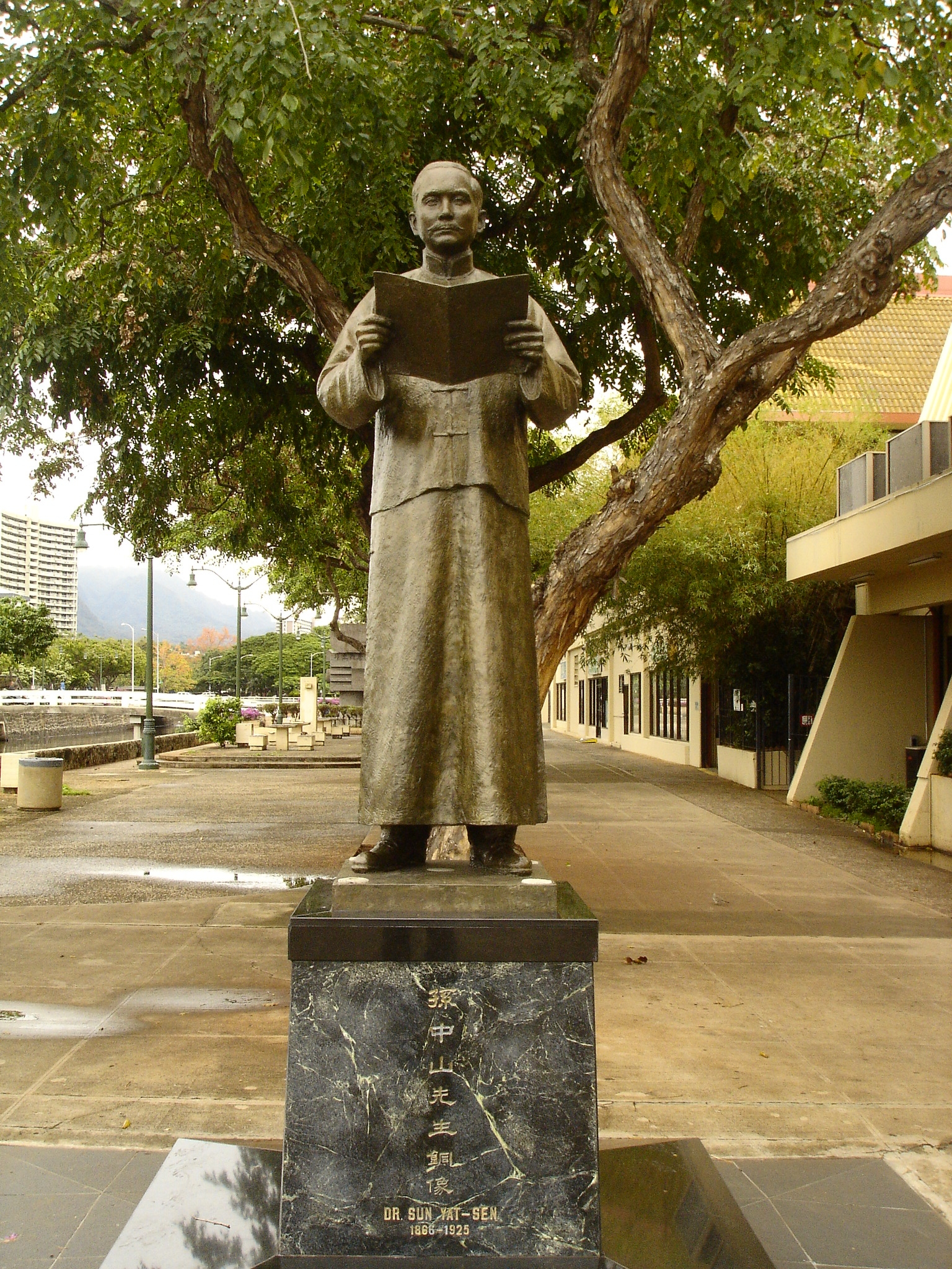 孫中山在zh:清朝末年積極為革命奔走，他在zh:檀香山創立了zh:興中會，至今紀念他的銅像還矗立在當地華埠的街頭...... 虎兒於2005年2月1日攝於檀香山華埠廣場。